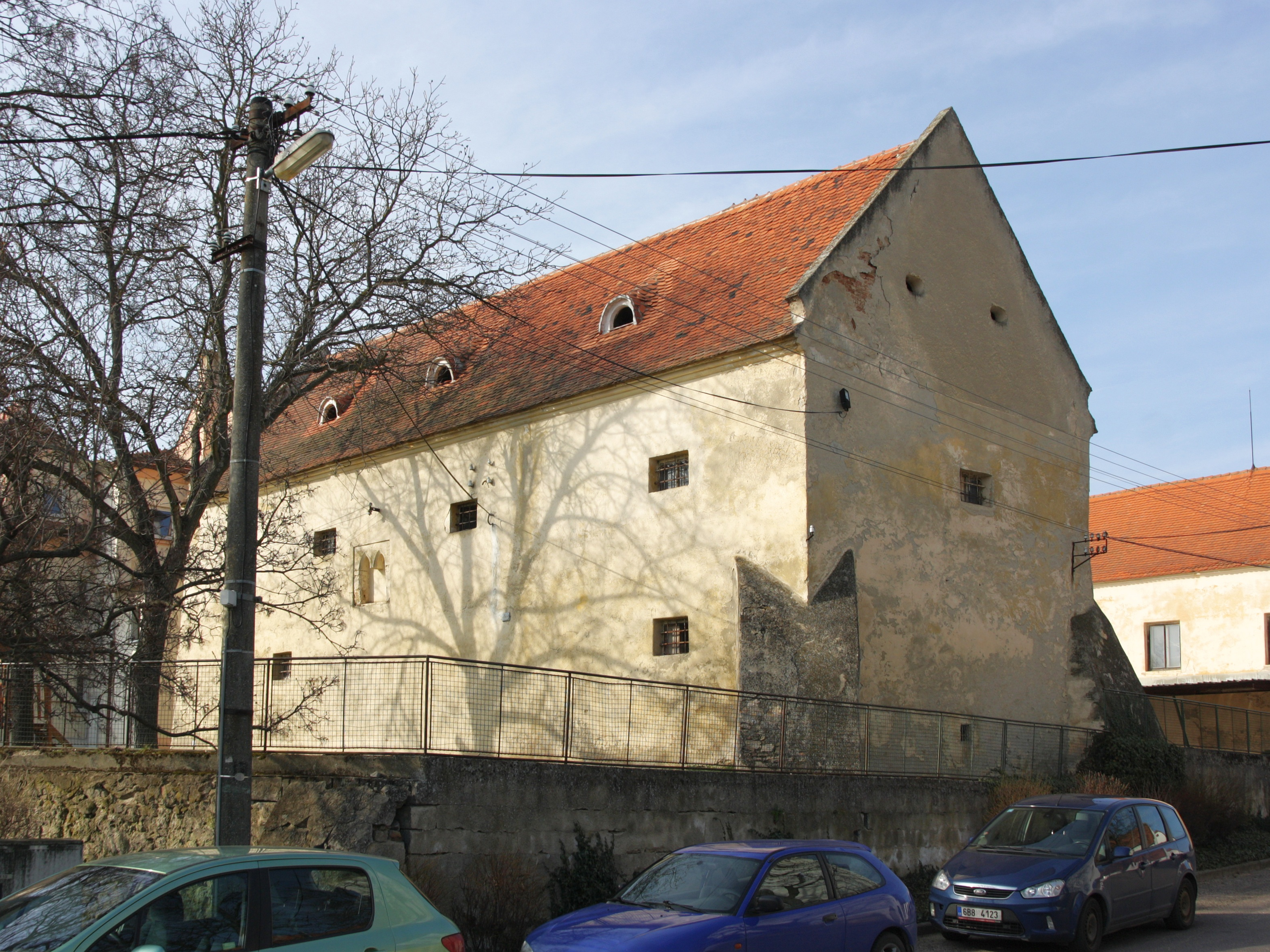 Horní Kounice - tvrz, bývalá johanitská komenda.